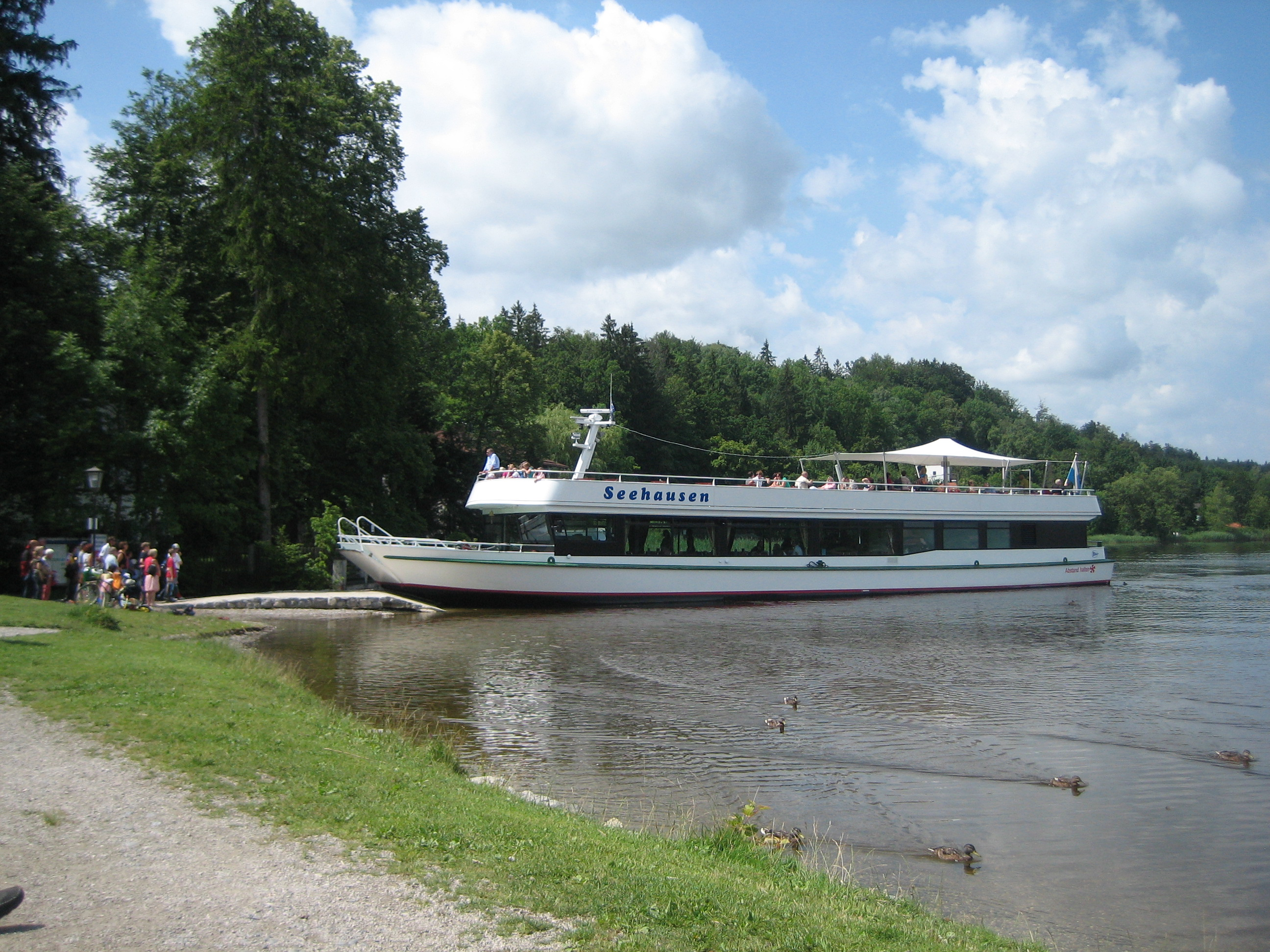 am Staffelsee; Fahrgastschiff Seehausen